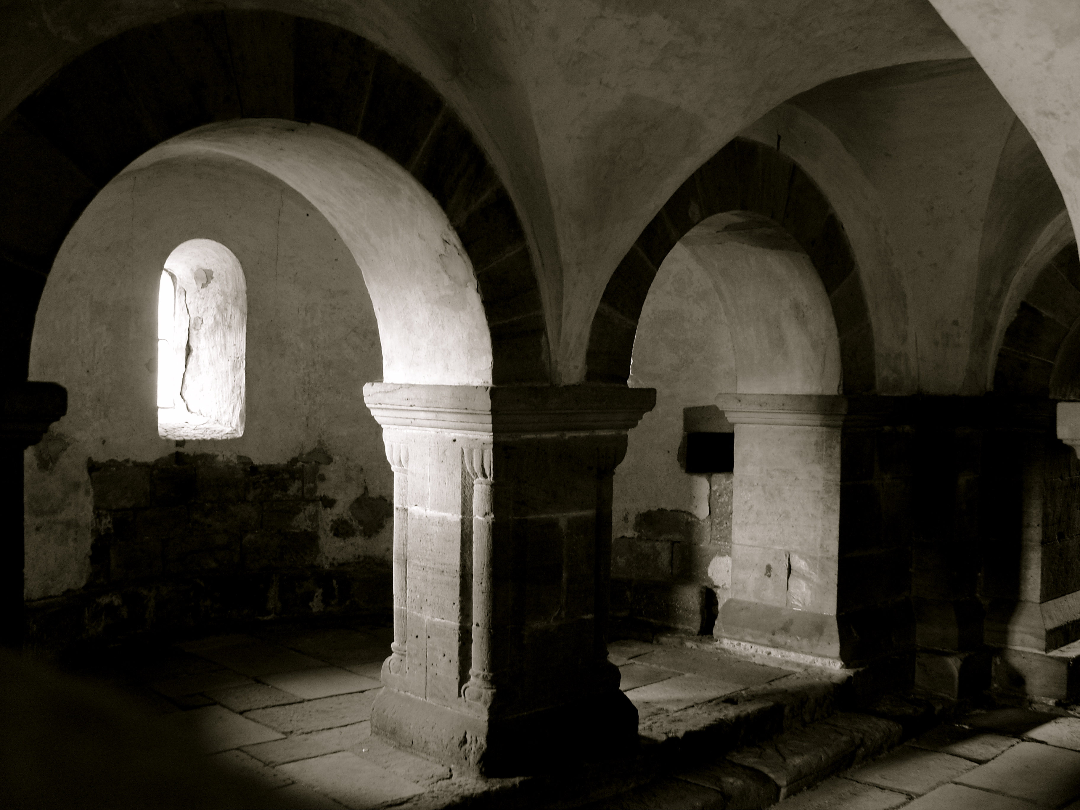 Krypta der Klosterkirche Germerode bei Kassel